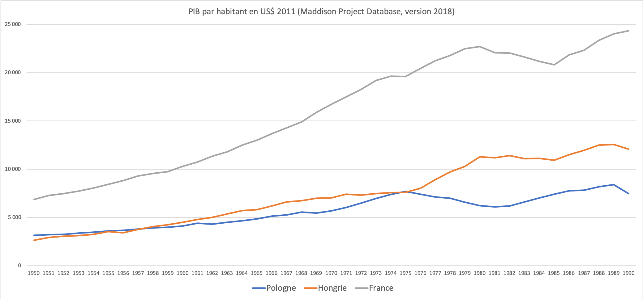 Graphique comparatif du PIB par habitant en US$ 2011 de la France, la Hongrie, la Pologne entre 1950 et 1990 Source des données : Maddison Project Database 2018